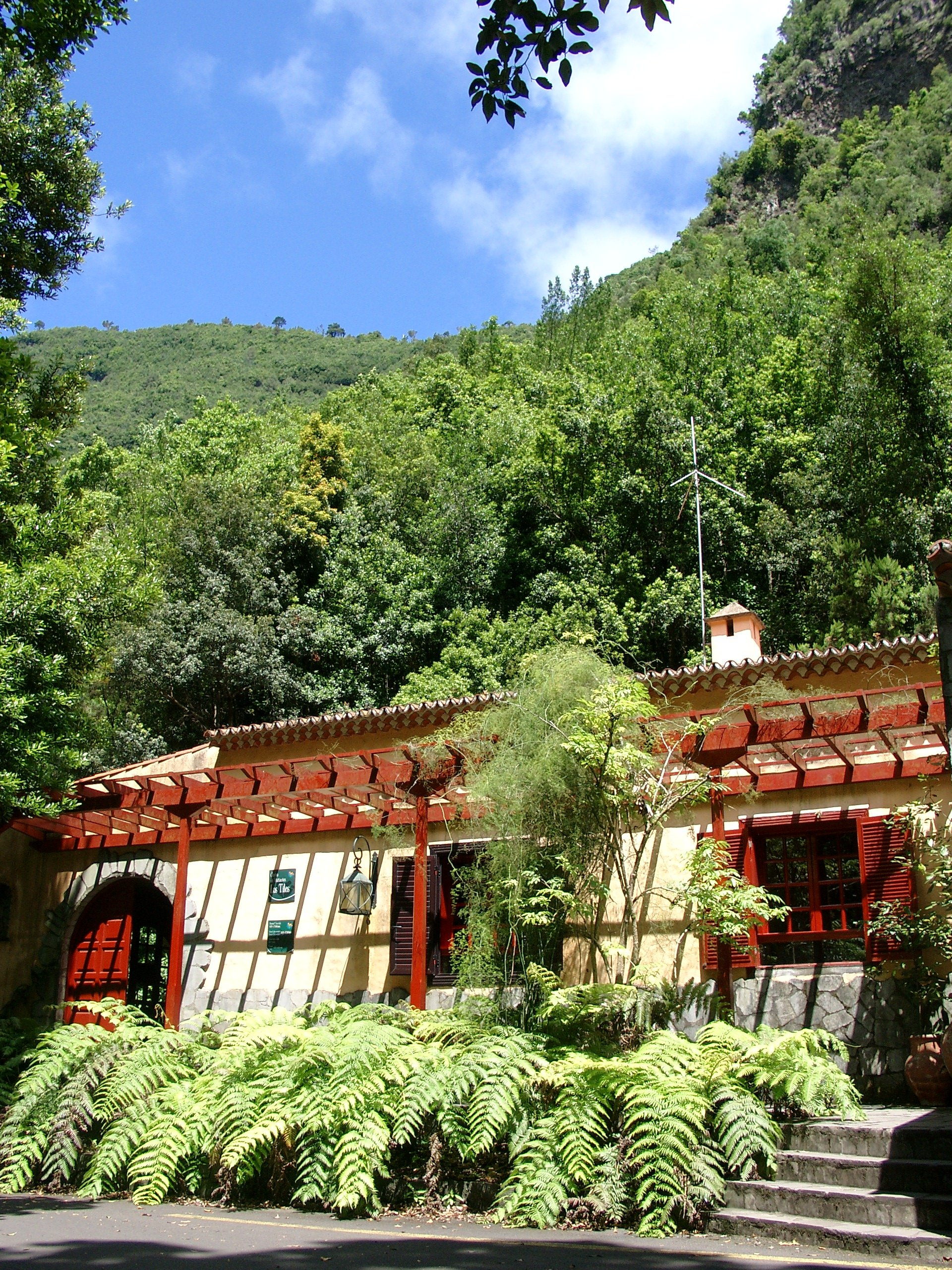 Visitor Center at Laural Forest Los Tilos on La Palma